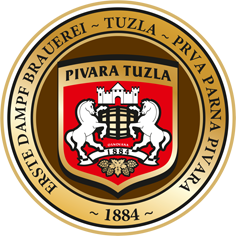 Ovo je zvanični grb Pivare Tuzla